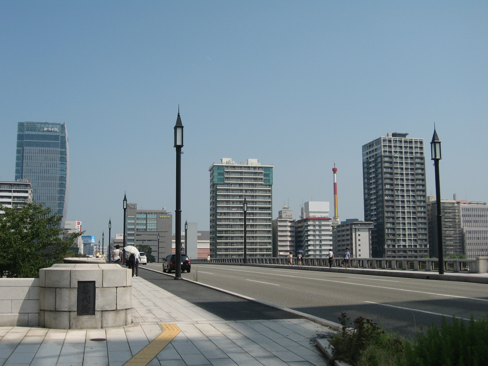 新潟市中央区。左岸側古町方面から見た萬代橋。